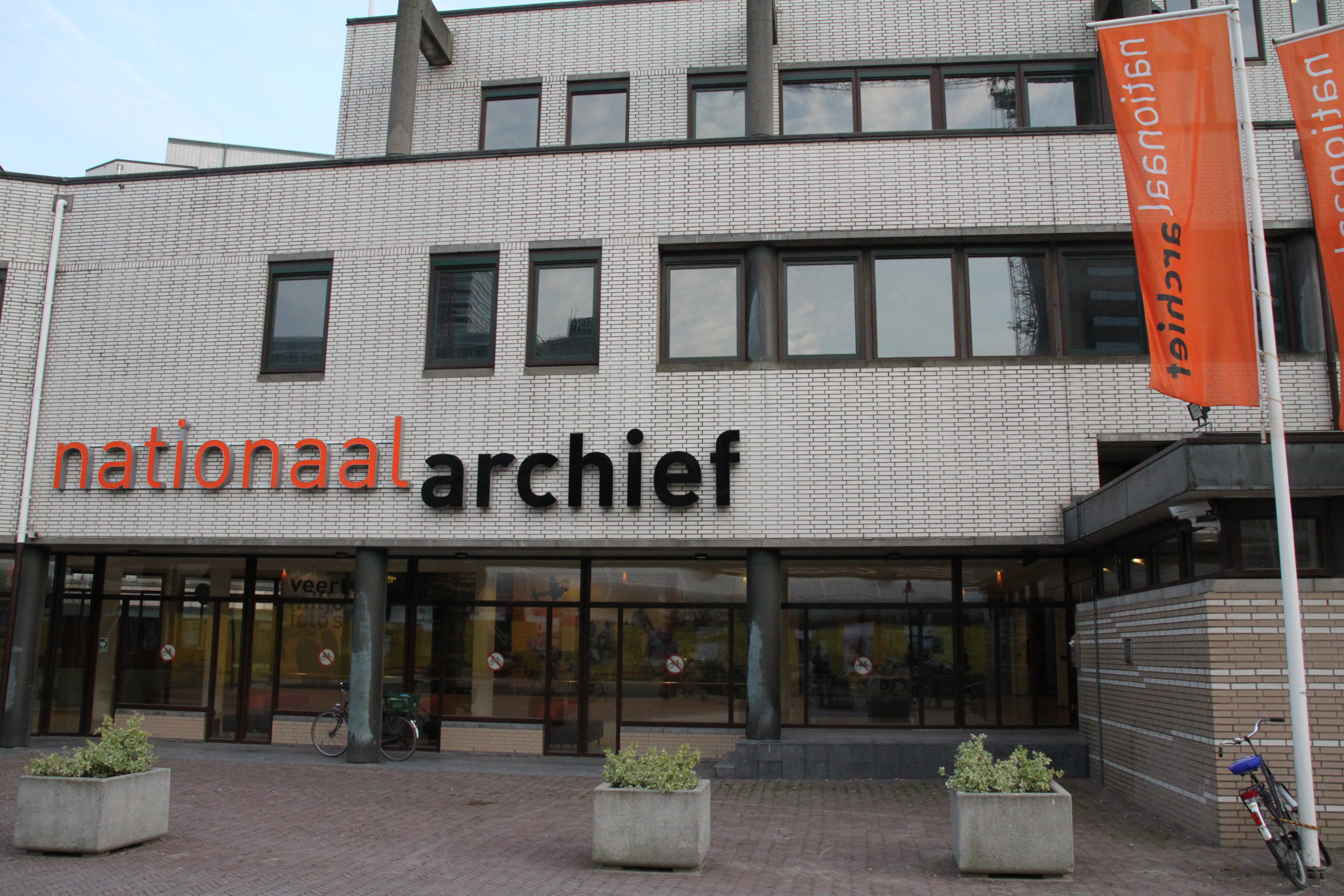 Ingang van het Nationaal Archief in Den Haag.